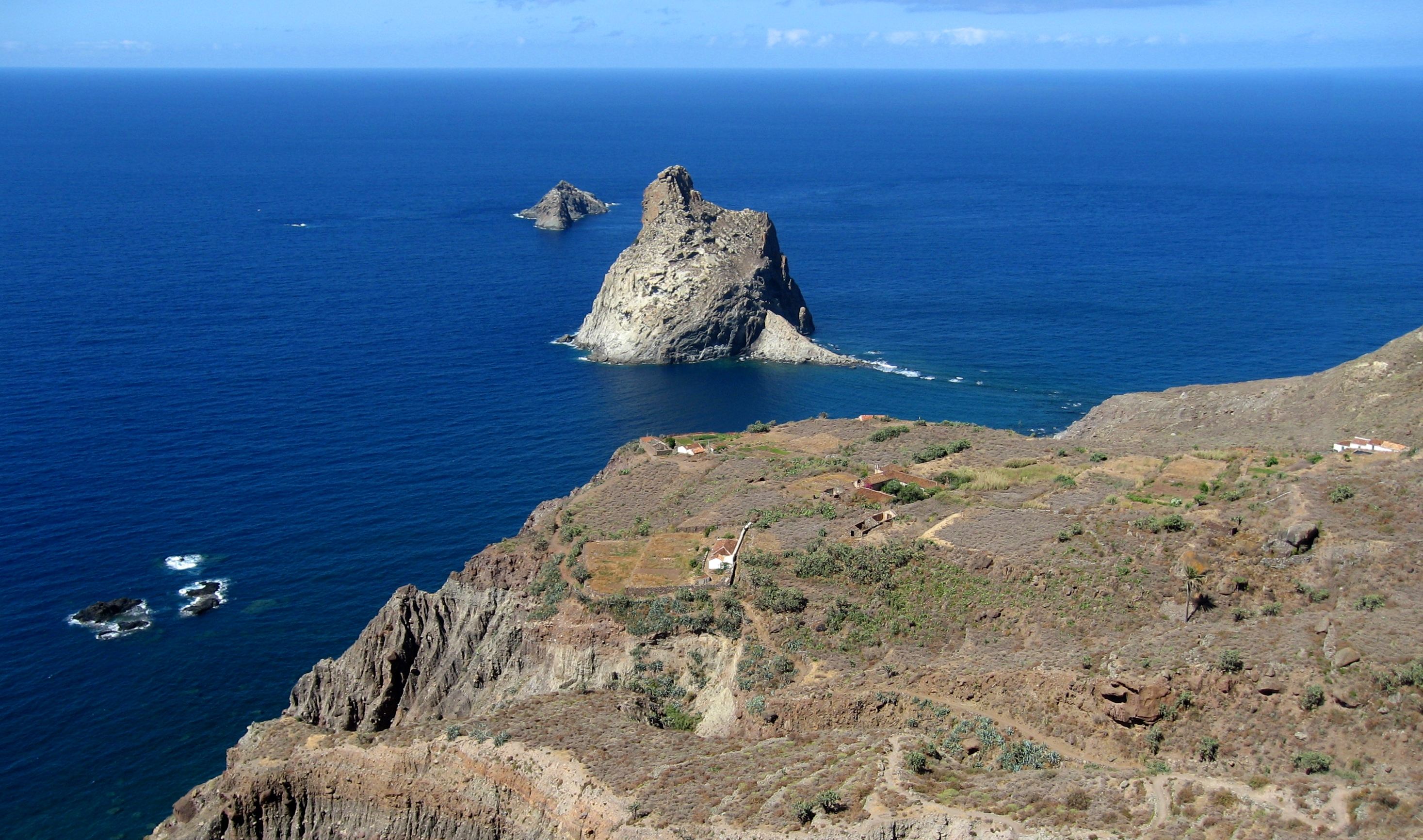 Vista de Las Palmas de Anaga.